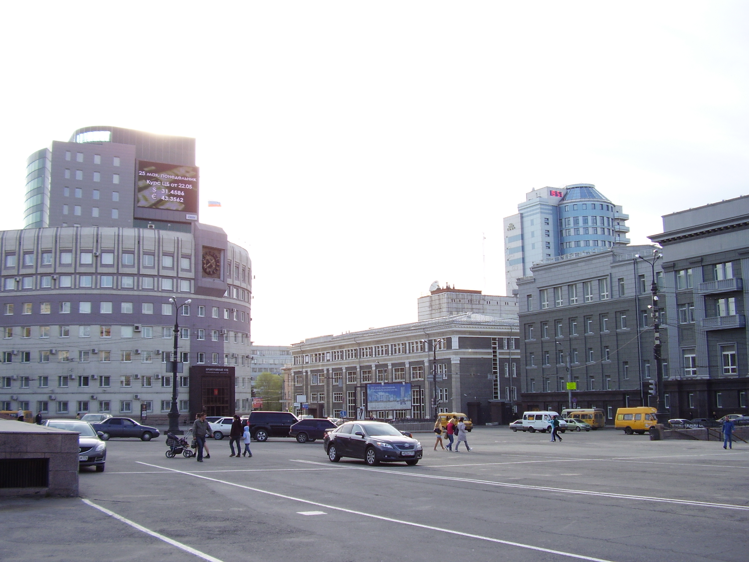 Вид на административные здания, с площади революции.